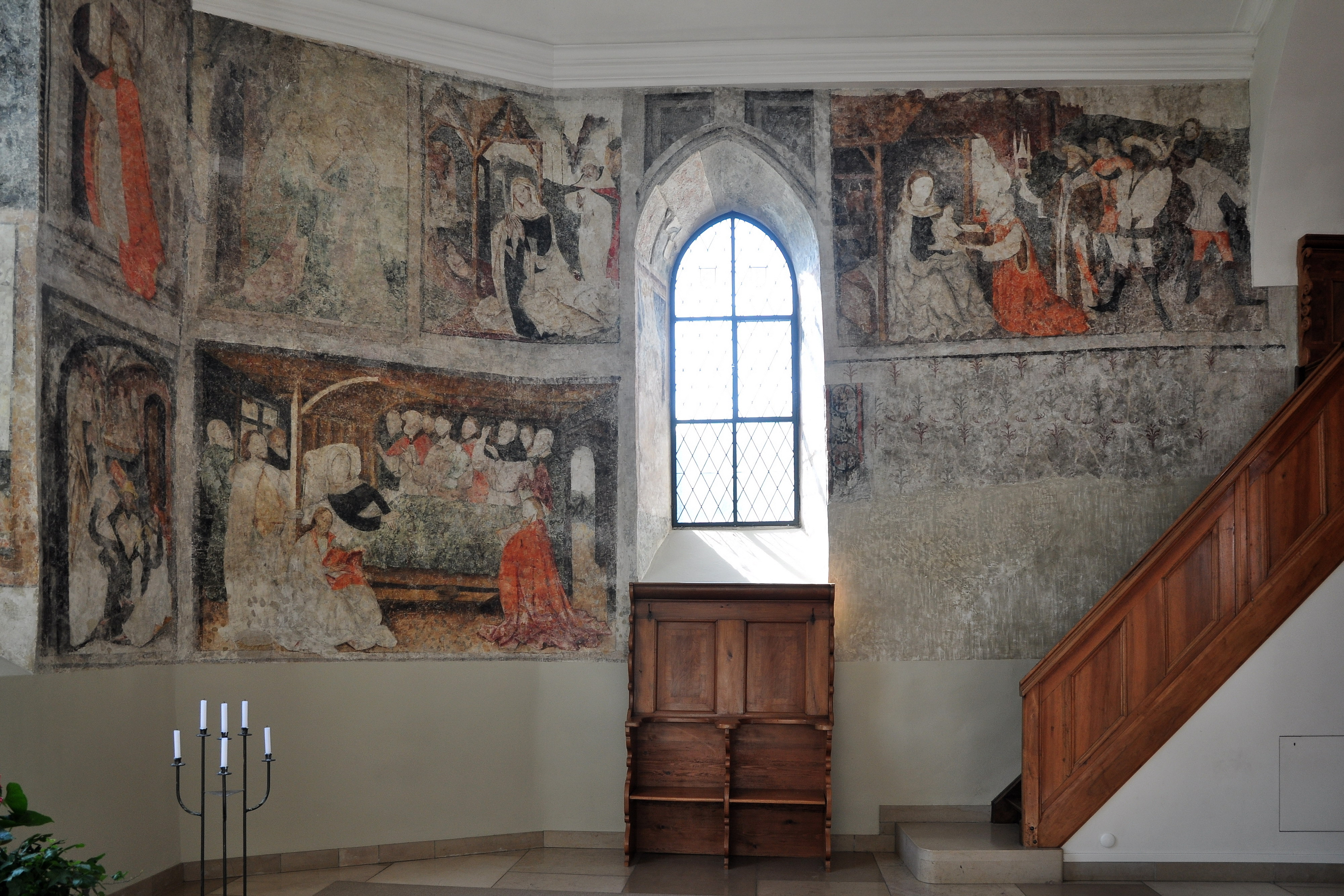 Reformierte Kirche, Chilengass in Eglisau (Switzerland) : Szenen aus dem Leben Marias, der einstigen Kirchenpatronin von Eglisau.